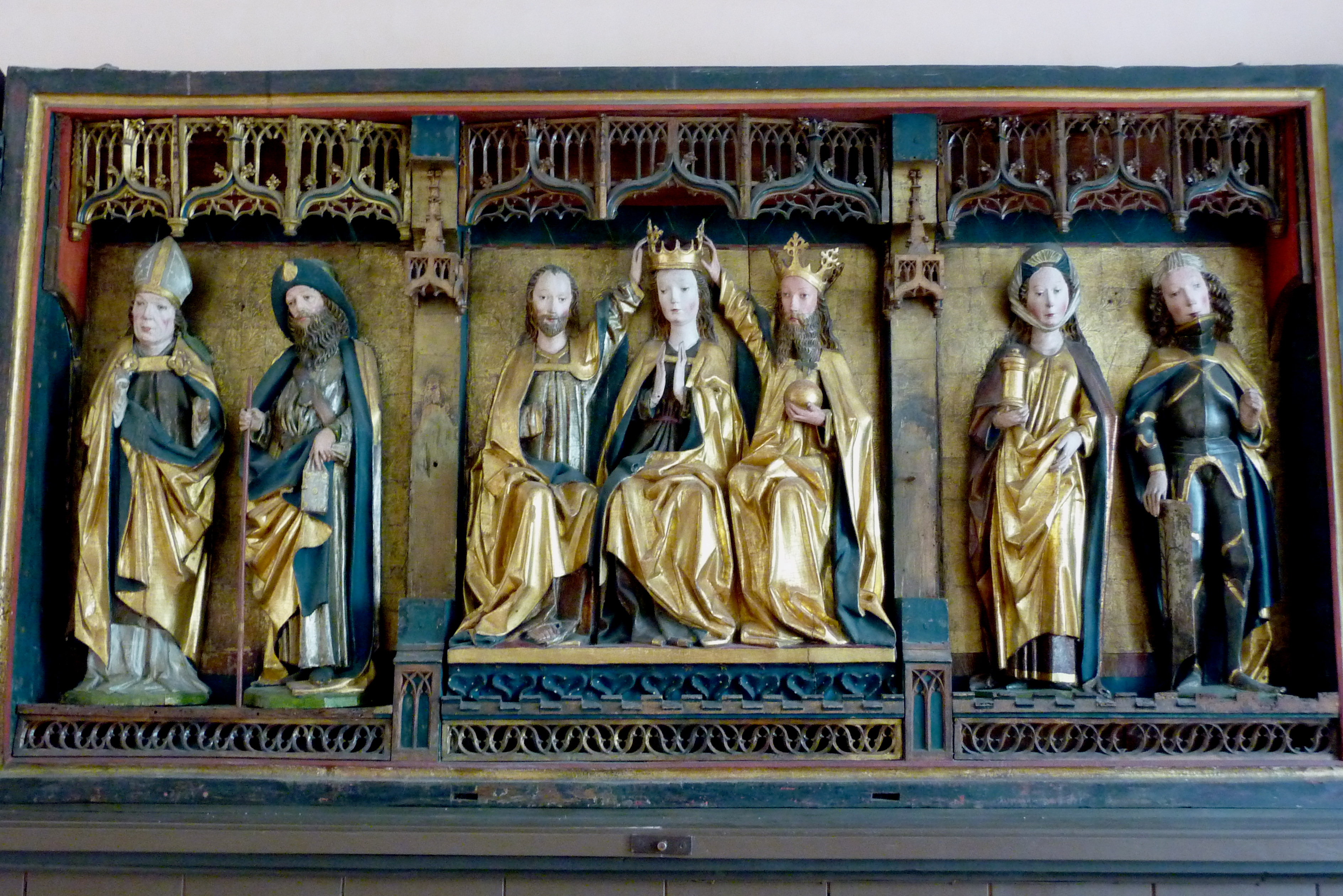 Lauterbacher Marienaltar, um 1480, im ehemaligen Stadtpalais Hohhaus (Hohhaus Museum) in Lauterbach (Hessen), dritter Zustand (ganz geöffnet), mit vergoldeteten Schnitzfiguren, Darstellung: Bonifatius, Apostel Jakobus d. Ältere, Marienkrönung (Mitte), Maria Magdalena und Simplicius von Rom (Stadtpatron von Lauterbach)